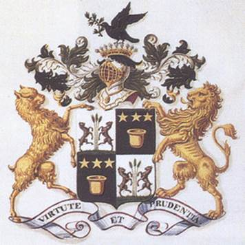 Un écu écartelé au 1er et 4ème d'argent à trois épis de blé de sinople, mouvement d'une terrasse du même, et accostés de deux chevreaux au naturel; au 2ème et 3ème de sable à une chaudière à brasser d'or, accompagnée de trois étoiles de même; l'écu timbré actuellement d'une couronne de comte et d'un casque d'argent grillé et liseré d'or, orné de ses lambrequins, cimier un corbeau sautant au naturel, tenant en son bec une branche de laurier de sinople.